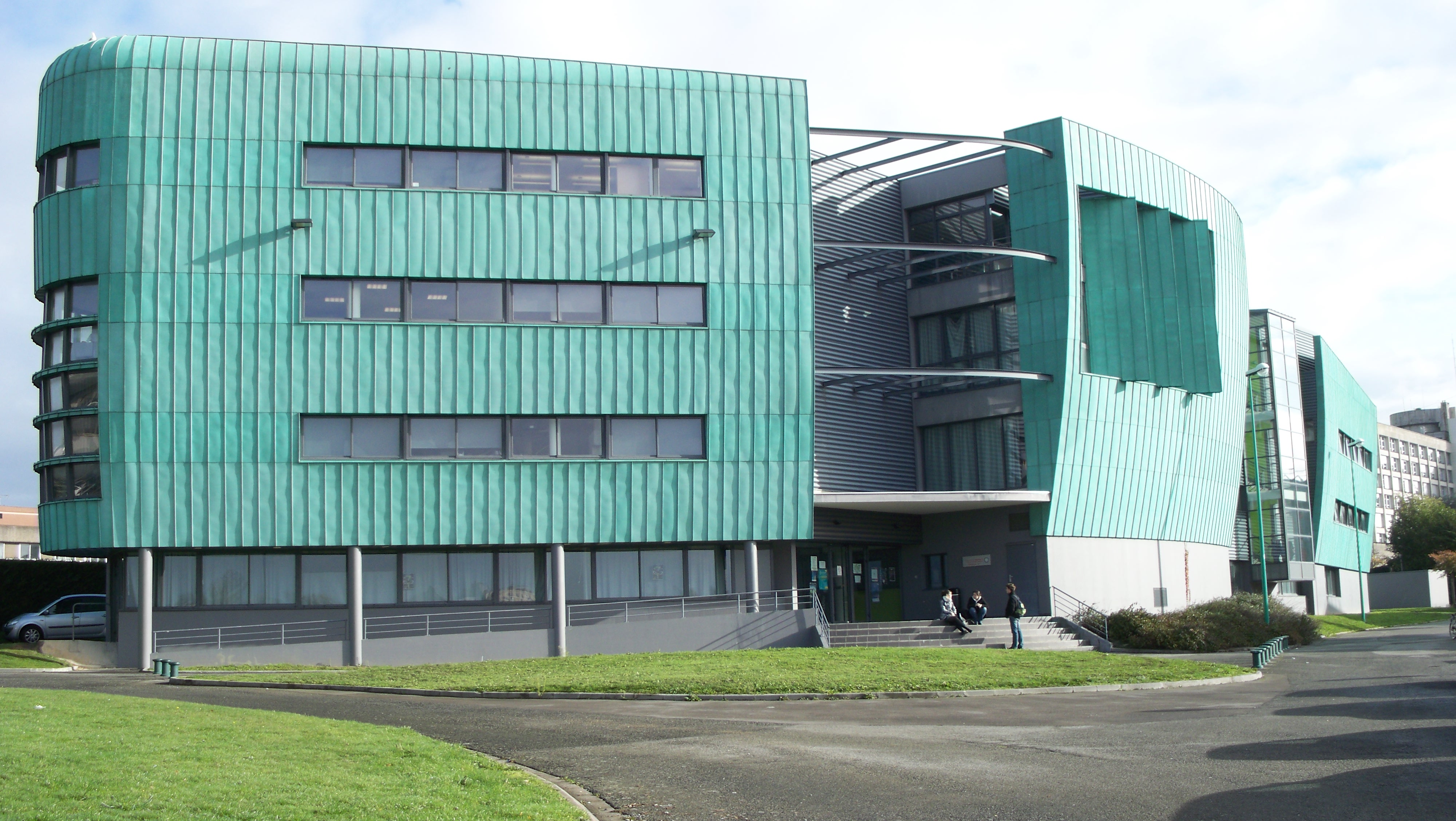 Le bâtiment 15 de l'UFR d'Odontologie, sur le Campus de Villejean, à Rennes.